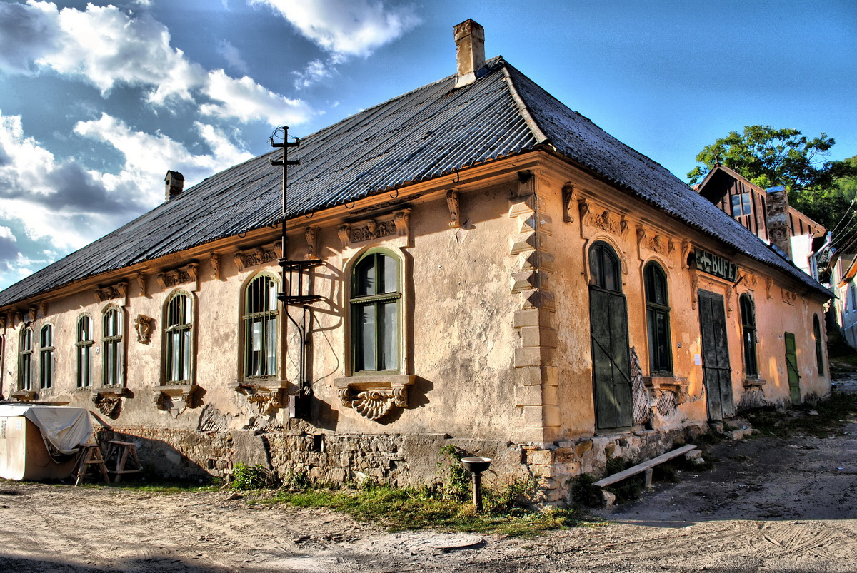 Casa - construita intre 1850-1900, a fost de-a lungul timpului cazinou, restaurant, spatiu comercial.